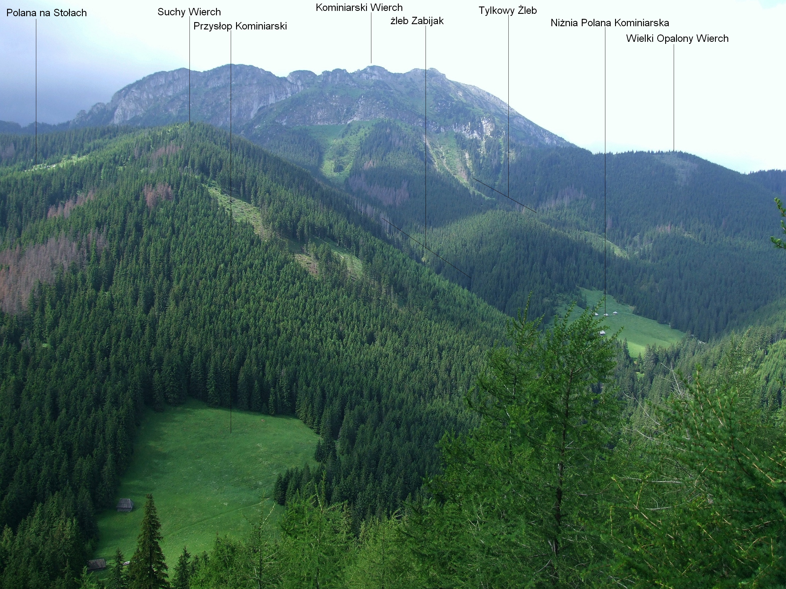 Rejon Komiarskiego Wierchu